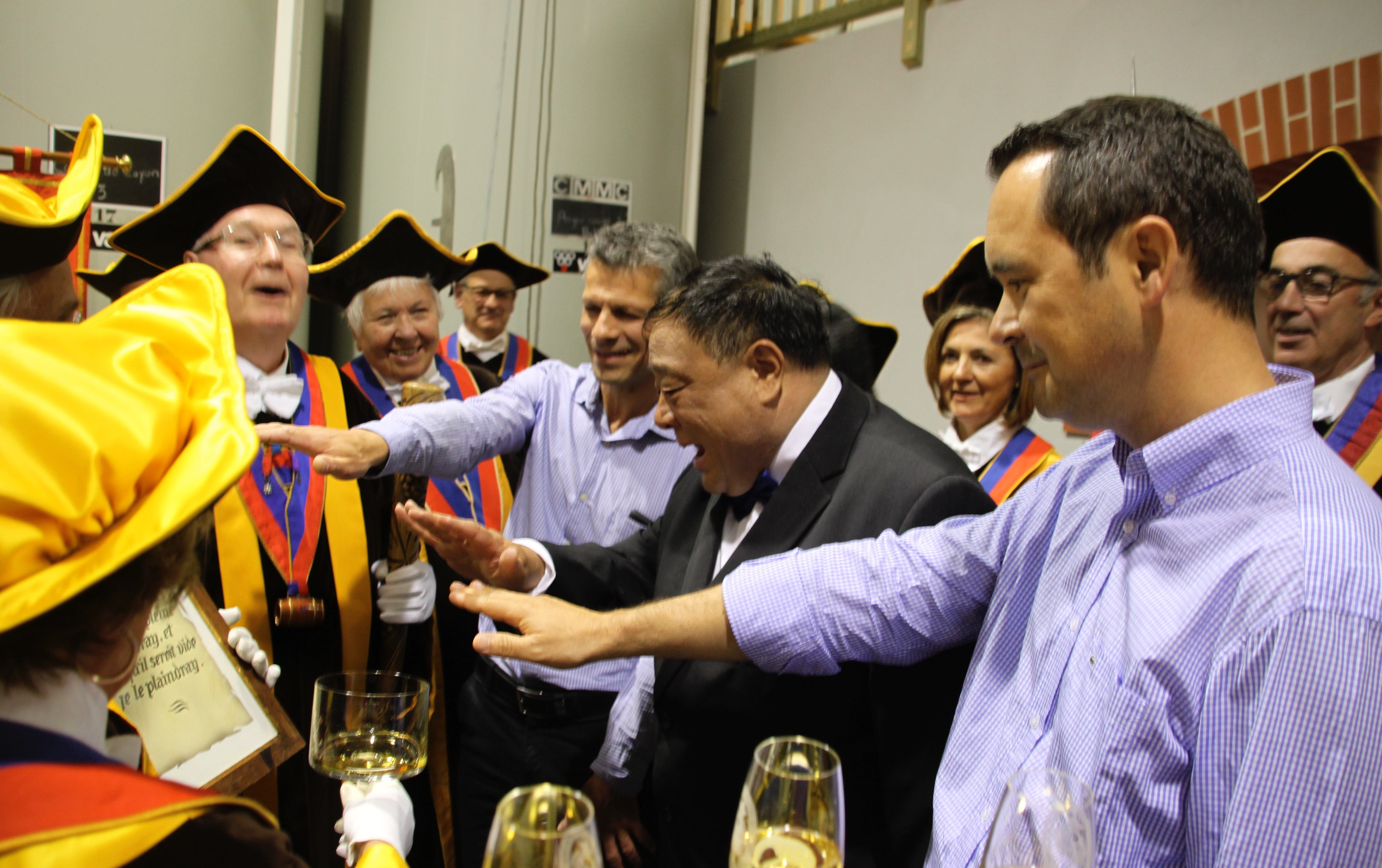 caves du domaine Gaudard